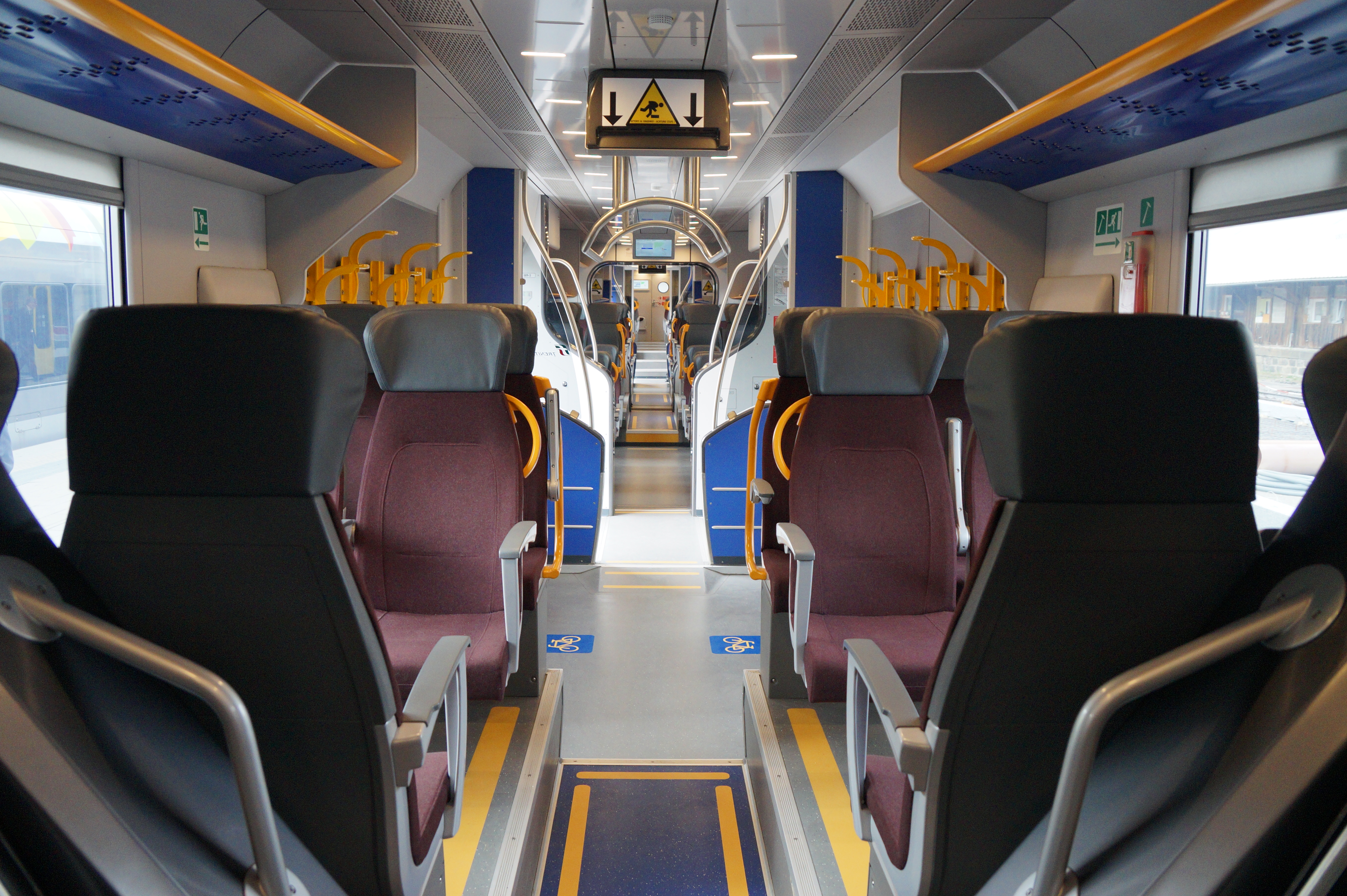 Innenaufnahme eines Zuges der Baureihe ETR.526